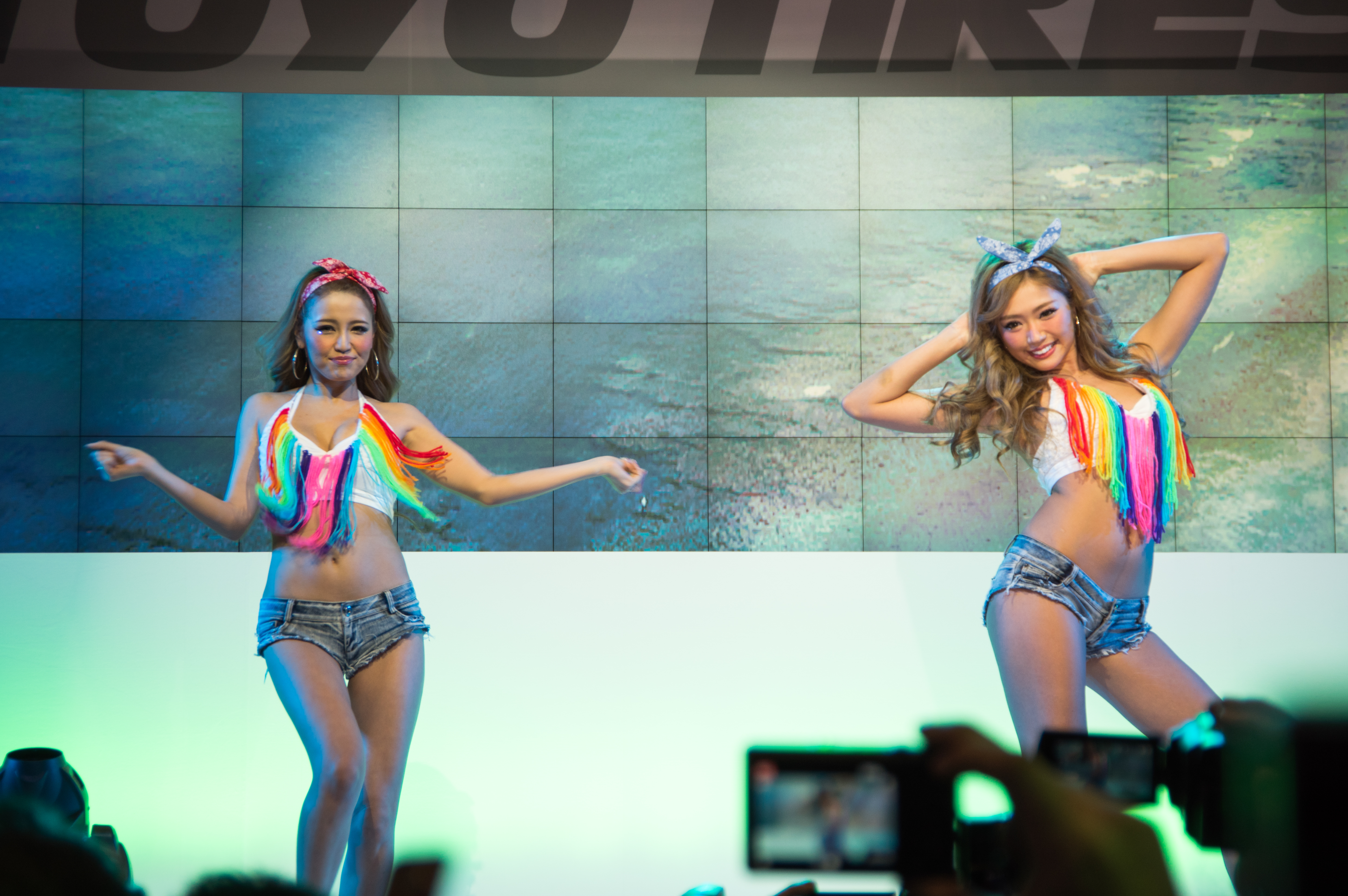 TOKYO AUTO SALON 2017 （東京オートサロン2017）-196.jpg